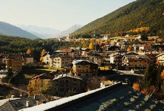 Panoramica della frazione di Premadio in Valdidentro (SO).